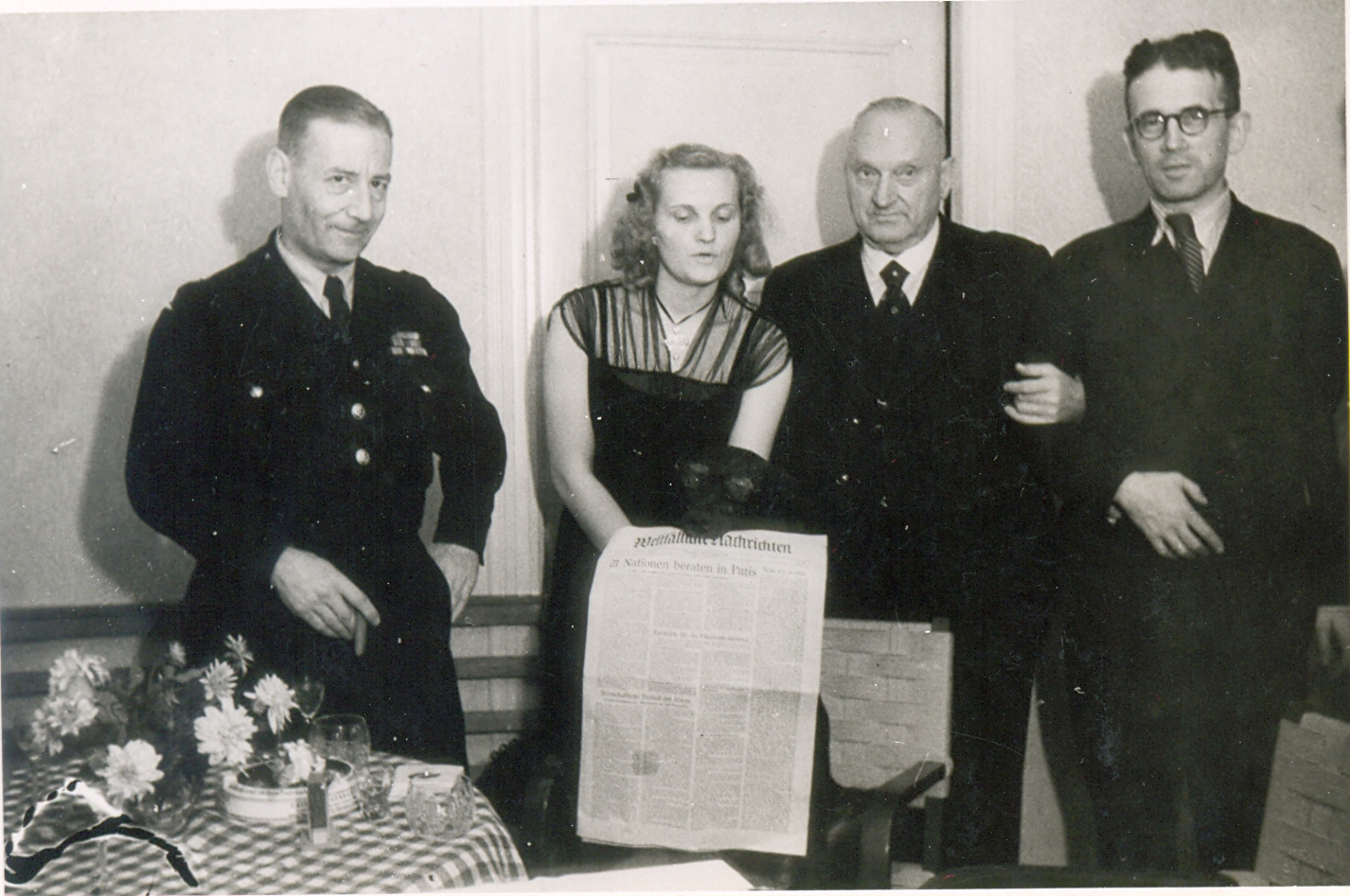 Präsentation erste Ausgabe der WN